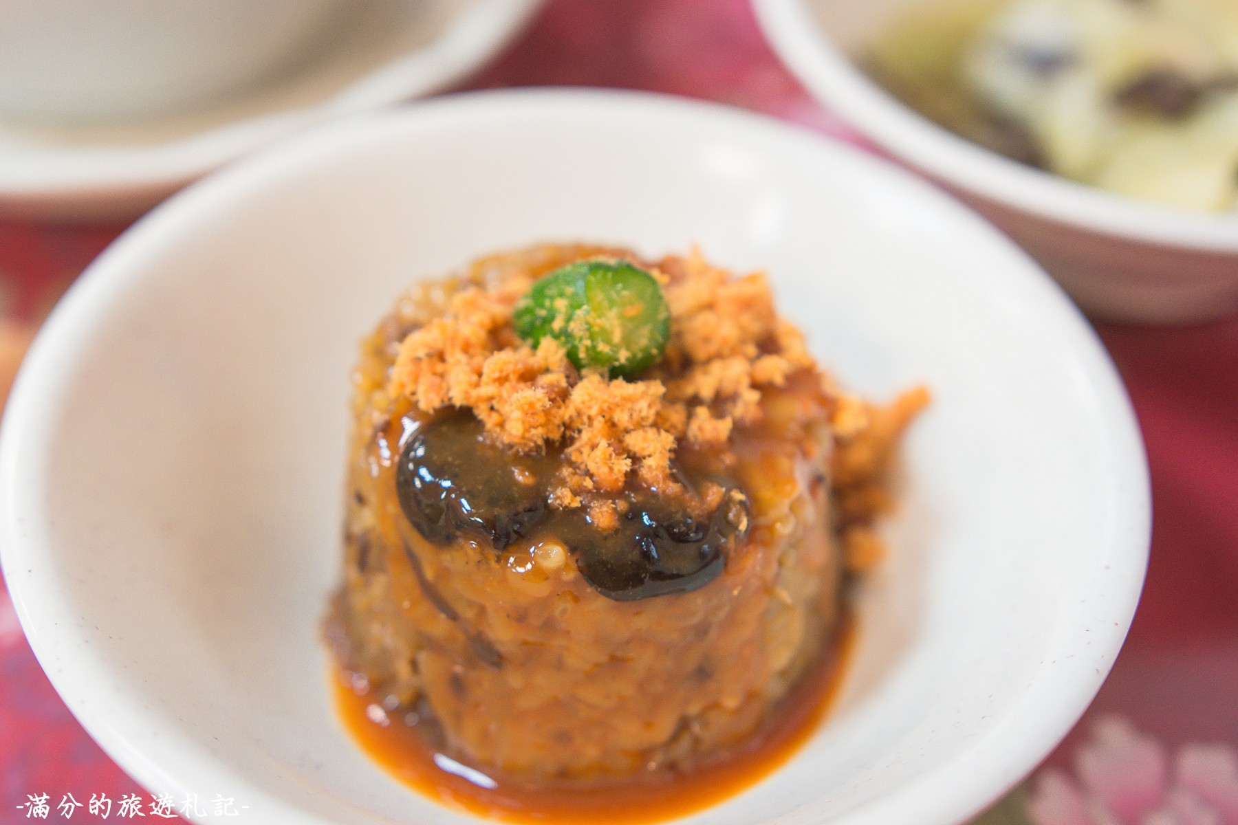 【新竹美食】第一碗滷肉飯 筒仔米糕